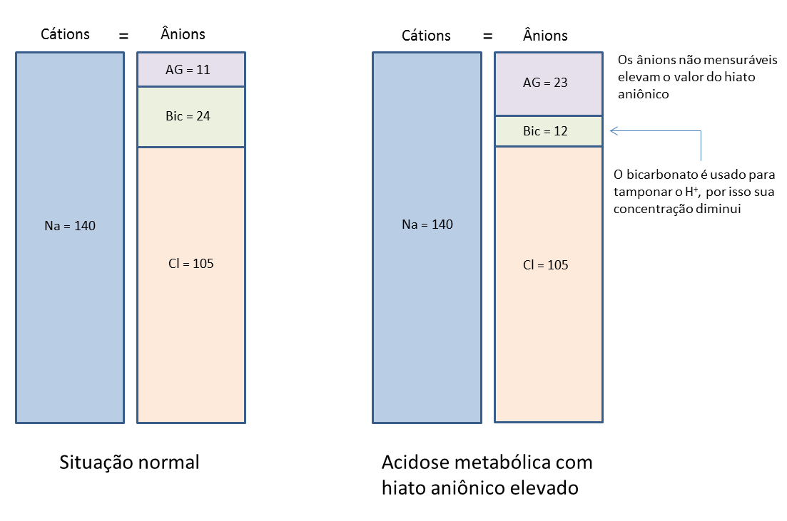 A retenção de um ânion não mensurável provoca elevação do hiato aniônico